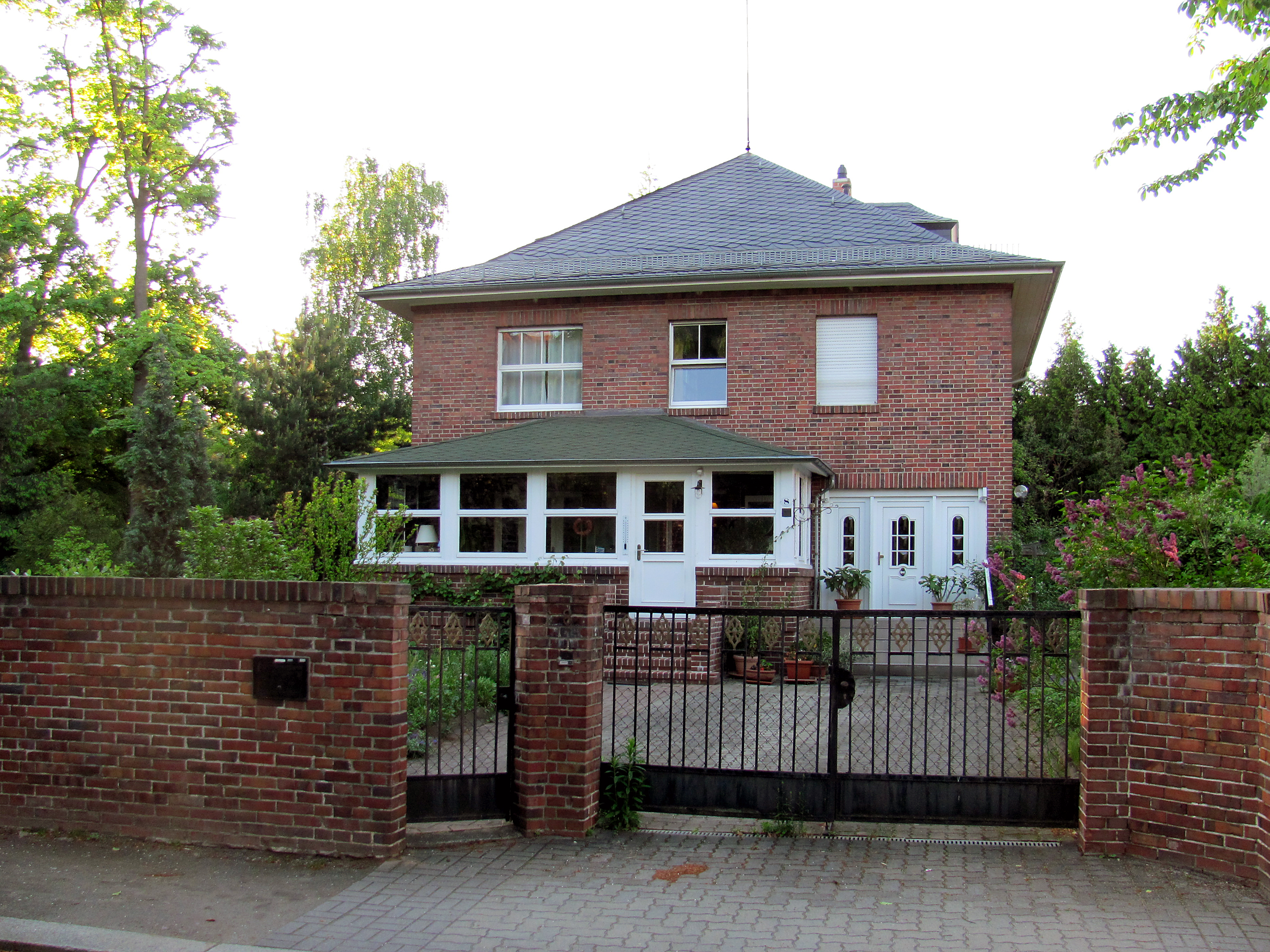 Radebeul-Serkowitz, Einfamilienhaus Edna Fromm